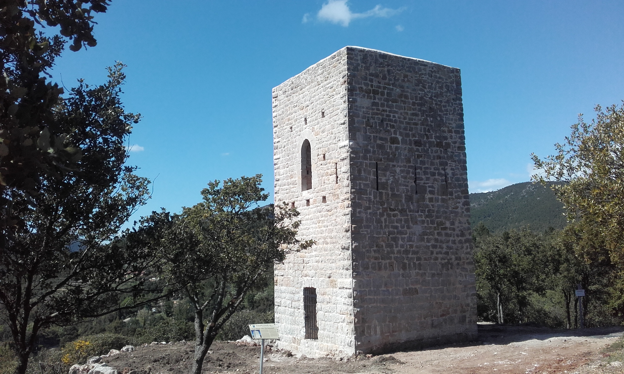 Var, Tourtour. La Tour de Grimaud dite tour de Grimaldi est une tour carrée unique composée d'un donjon résidentiel à caractère défensif, de chaînes d'angles en pierres de taille aux parements en bossages et des murs en moellons de pierre froide assisées. Elle est dotée de deux portes et quelques meurtrières. On y accédait par le premier étage au moyen d'une échelle qui était ensuite retirée. Elle servait à descendre au rez-de-chaussée par une trappe ainsi qu'à accéder aux étages supérieurs. Le rez-de-chaussée servait d'entrepôt pour les vivres. Suite à des dégâts subis par la foudre, les chaînes d'angles du sommet de la tour menaçaient de s'écrouler. Elle a été restaurée en 2018. (Source : extraits du panneau signalétique de présentation de la Tour)